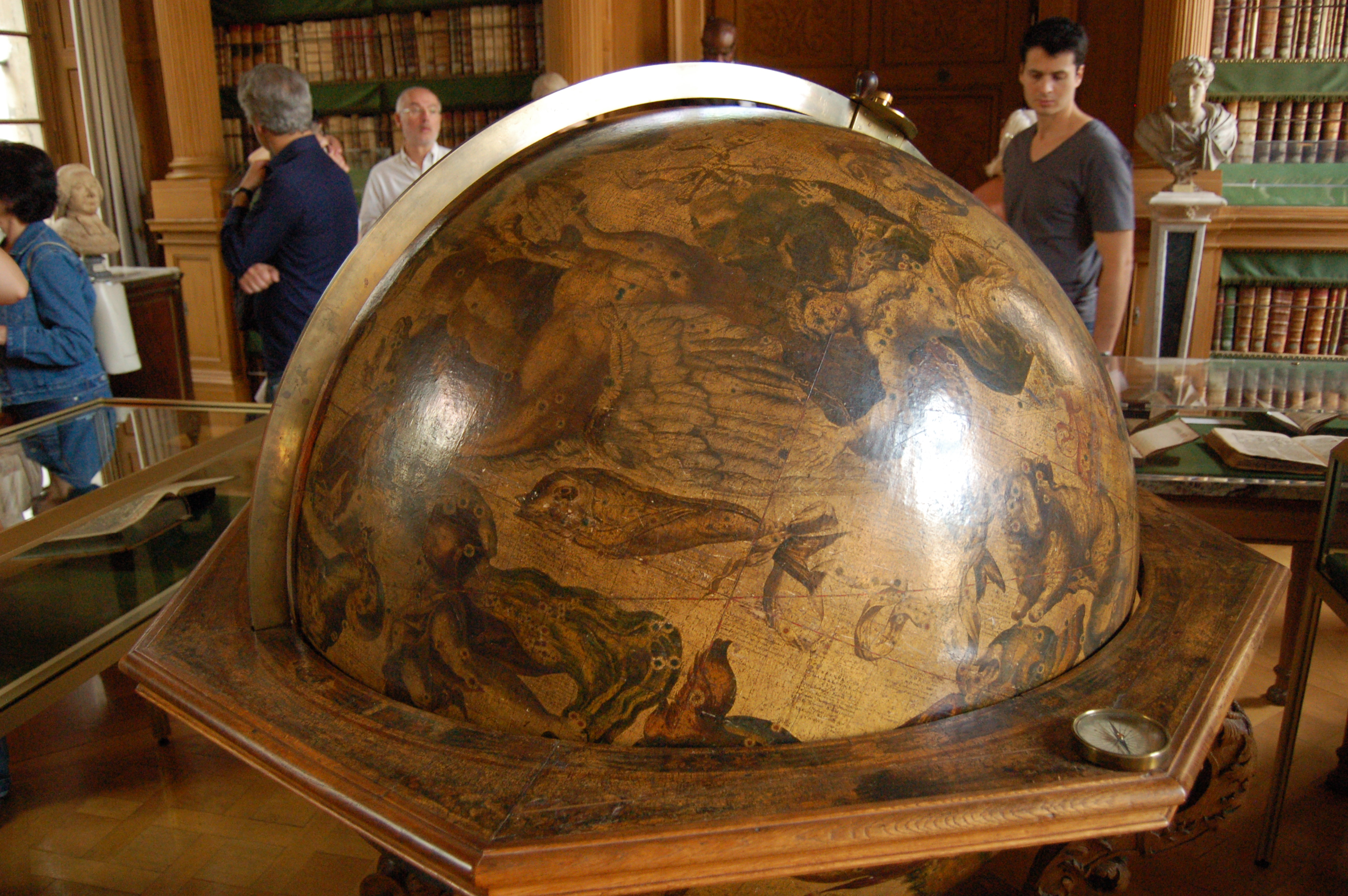 Globe céleste trônant dans la bibliothèque Mazarine, au sein de l'Institut de France